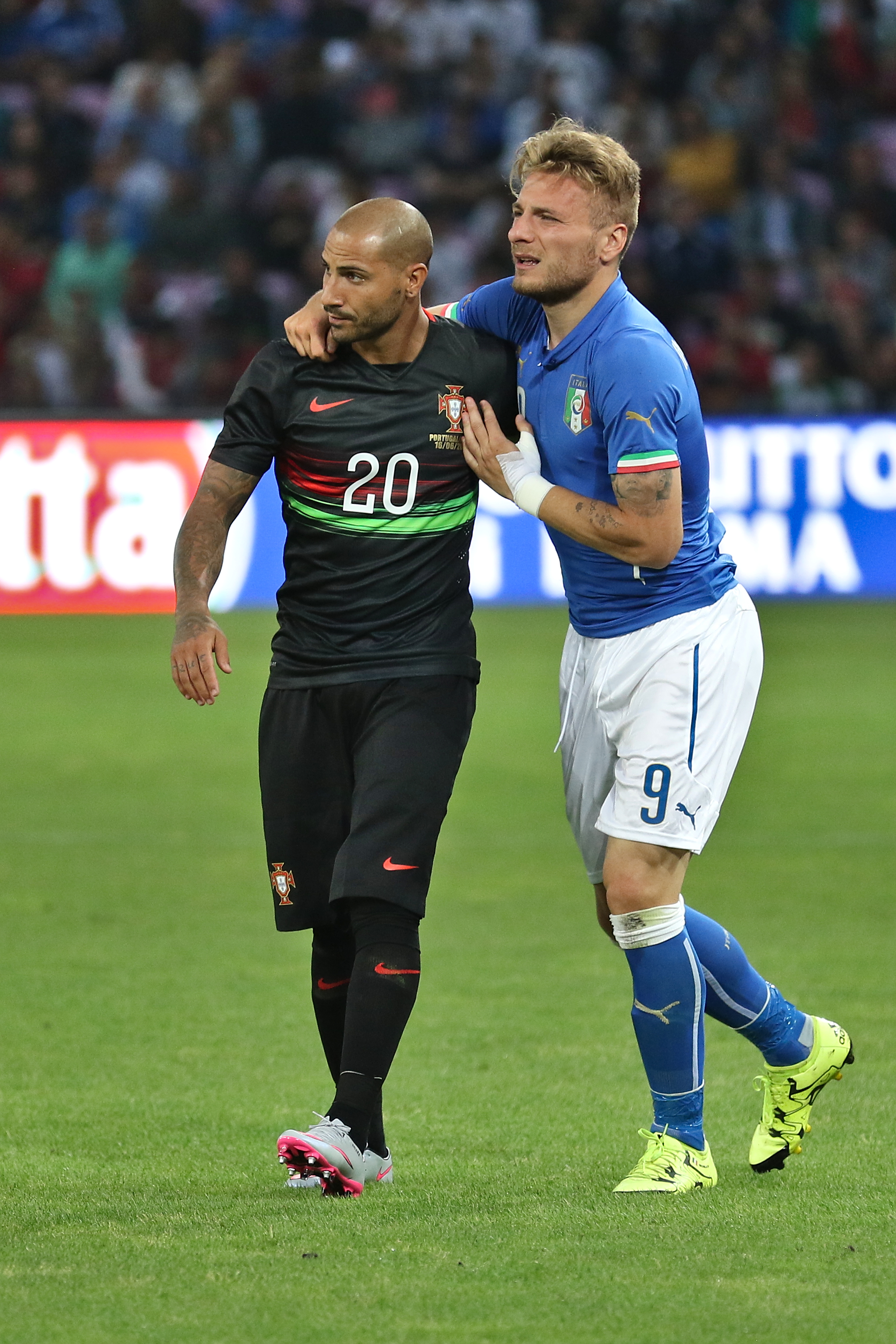 20150616 - Portugal - Italie - Genève - Ricardo Quaresma et Ciro Immobile